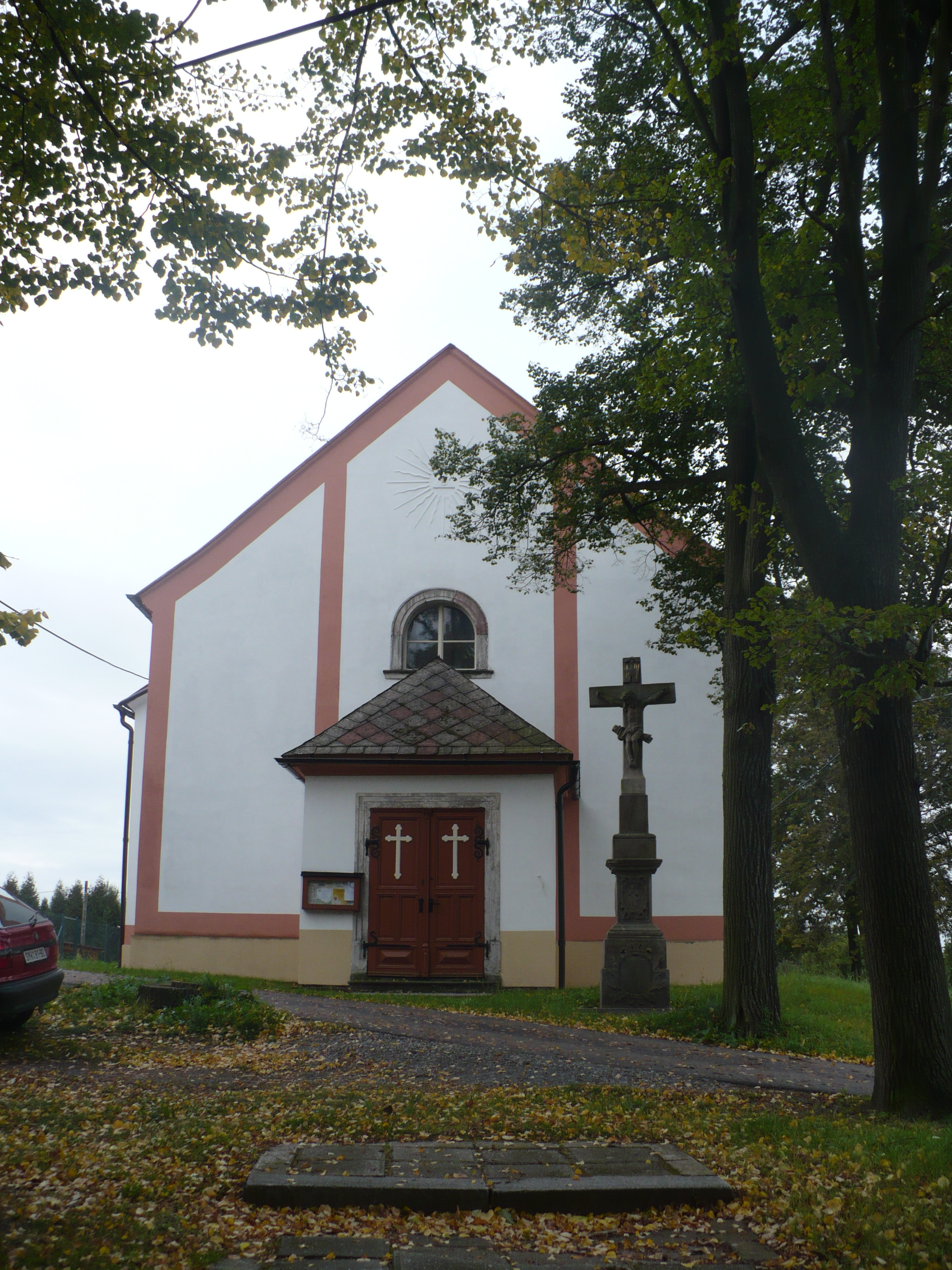 Kostel Nejsvětější Trojice Mladějov na Moravě